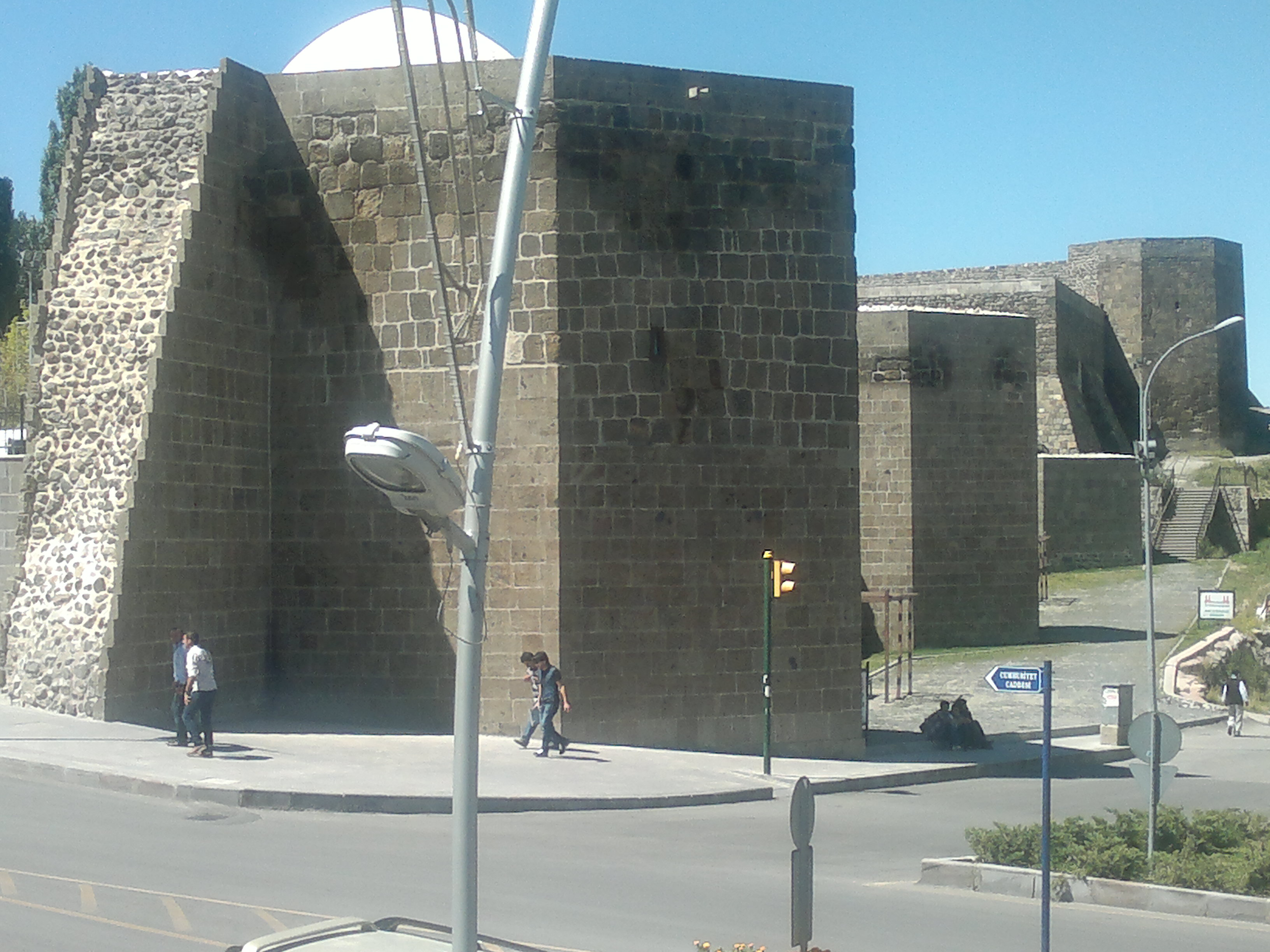 Erzurum Kalesi Orta Sur